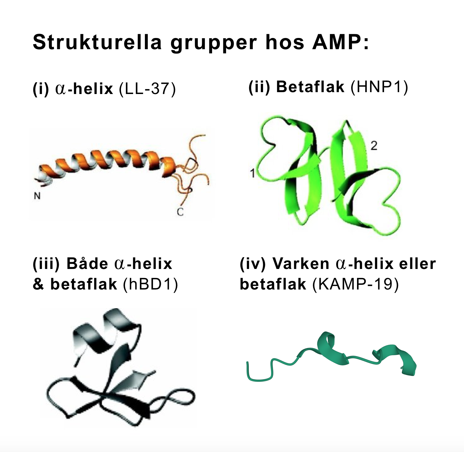 Strukturell information från 4 AMP är hämtad från Research Collaboratory Structural Bioinformatics Protein Databank ( med hjälp av verktyget Mol*, och har sammanförts till en enhetligt bild men beskrivande text. Identifikationsnummer i denna proteindatabas för strukturerna ovan är 2K6O för LL-37, 1E4S för HNP1, 3GNY för hBD1 samt 5KI0 för KAMP-19. Primary Citations: Wang, G. (2008) Structures of human host defense cathelicidin LL-37 and its smallest antimicrobial peptide KR-12 in lipid micelles. Doi 10.1074/jbc.M805533200; Bauer, F., Schweimer, K., Kluver, E., Conejo-Garcia, J., Forssmann, W.G., Roesch, P., Adermann, K., Sticht, H. (2001) Structure Determination of Human and Murine Beta-Defensins Reveals Structural Conservation in the Absence of Significant Sequence Similarity. Doi 10.1110/ps.24401; Wei, G., de Leeuw, E., Pazgier, M., Yuan, W., Zou, G., Wang, J., Ericksen, B., Lu, W.Y., Lehrer, R.I., Lu, W. (2009) Through the looking glass, mechanistic insights from enantiomeric human defensins. Doi 10.1074/jbc.M109.018085; Lee, J.T., Wang, G., Tam, Y.T., Tam, C. (2016) Membrane-Active Epithelial Keratin 6A Fragments (KAMPs) Are Unique Human Antimicrobial Peptides with a Non-alpha beta Structure. Doi 10.3389/fmicb.2016.01799; D. Sehnal, A.S. Rose, J. Kovca, S.K. Burley, S. Velankar (2018) Mol*: Towards a common library and tools for web molecular graphics MolVA/EuroVis Proceedings. Doi 10.2312/molva.20181103.